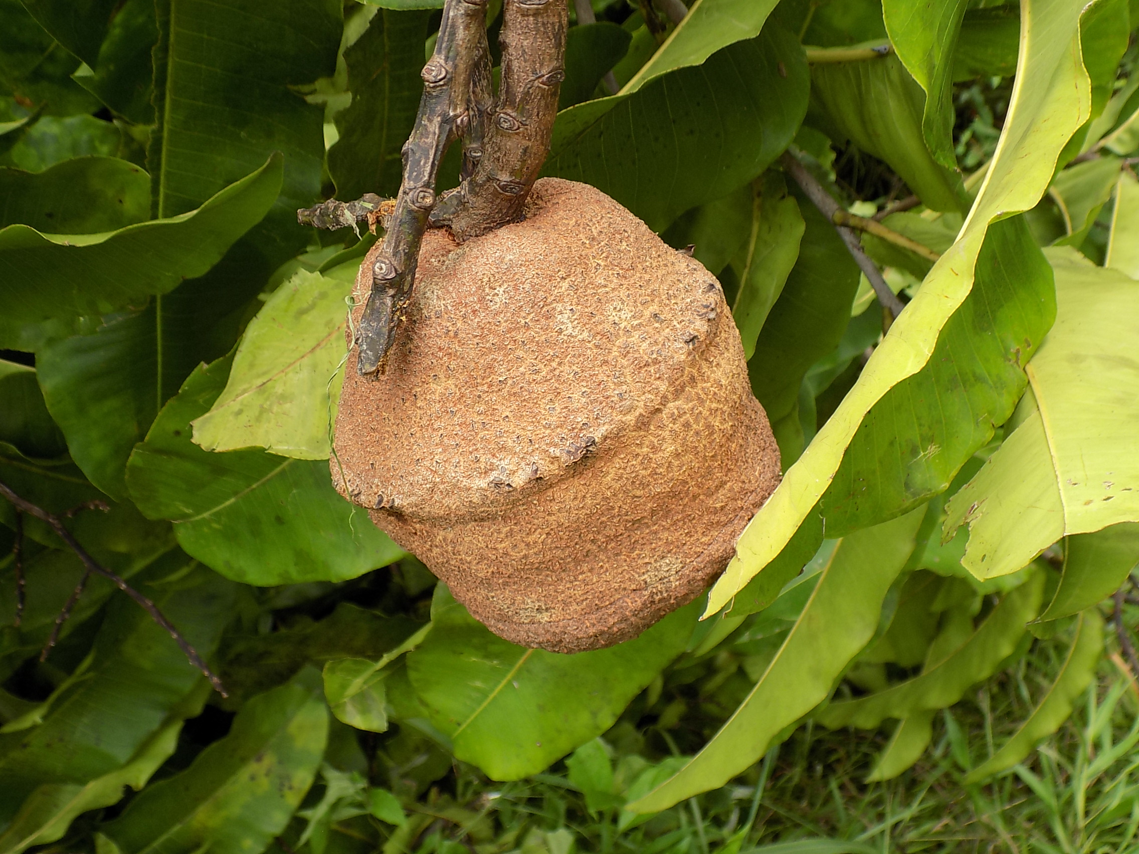 Urabá, Antioquia. Nombre común "Olleto"